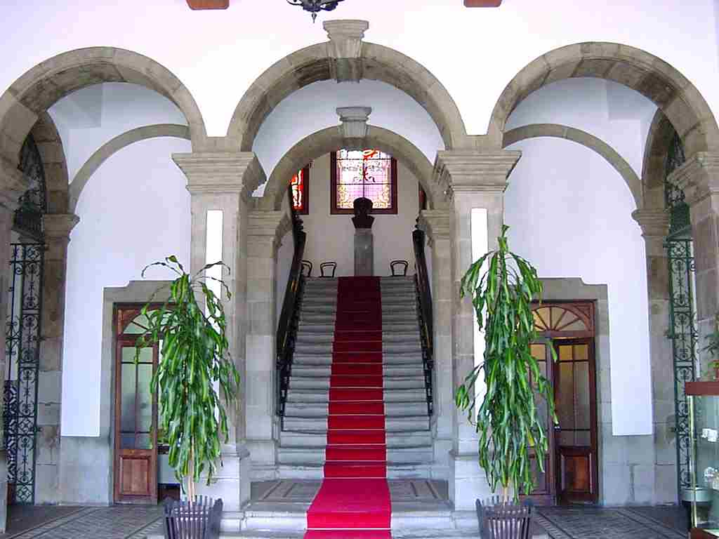 Câmara Municipal de Angra do Heroísmo, aspectos do interior, entrada.